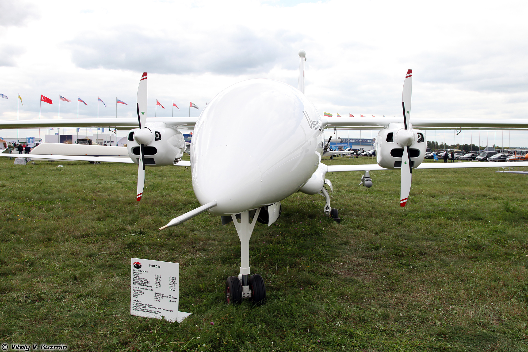 БПЛА United 40 из ОАЭ (United 40 UAV from UAE)